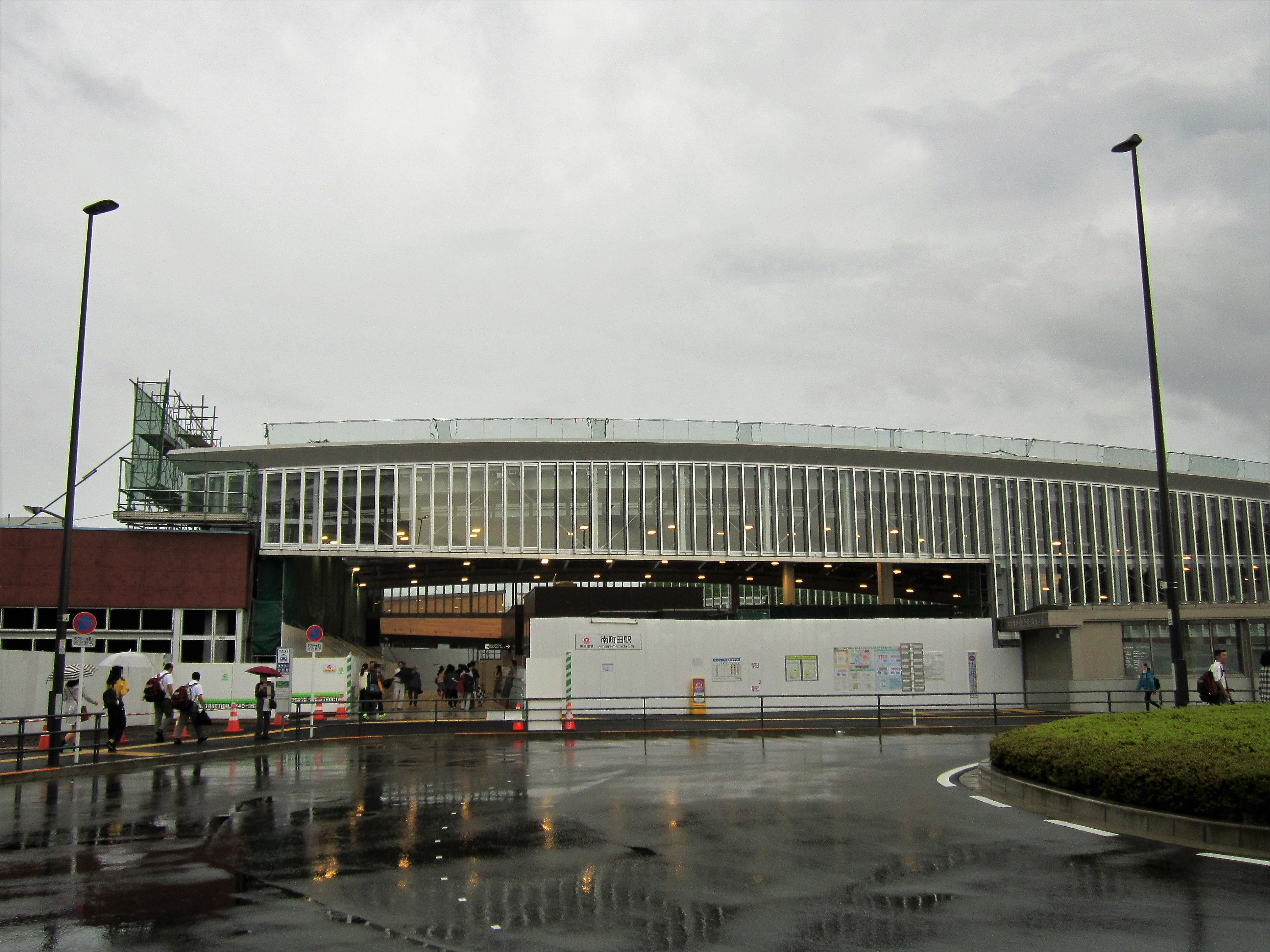 改築工事中の南町田駅北口